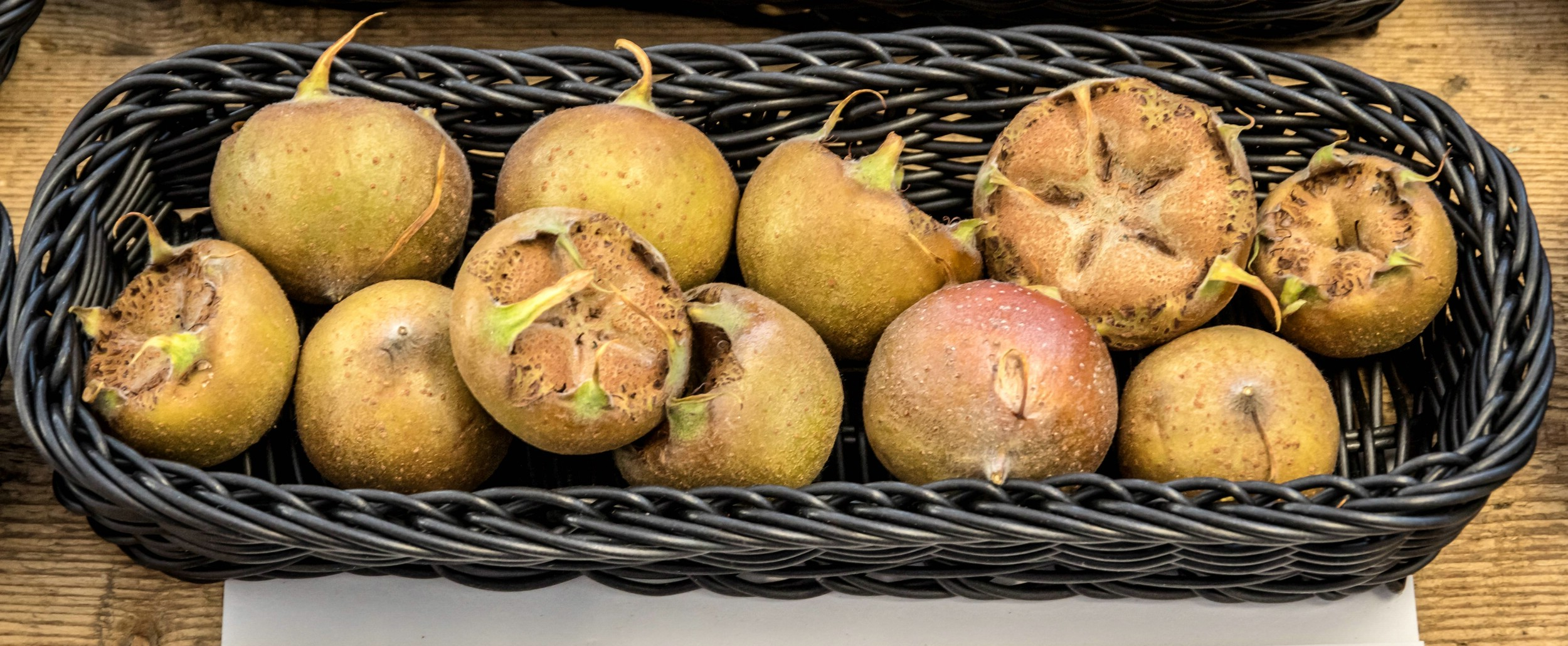 Mispel (Mespilus germanica), von denen es im Badischen noch tragende Bäume gibt. Alle Aufnahmen au dem Oktober 2015